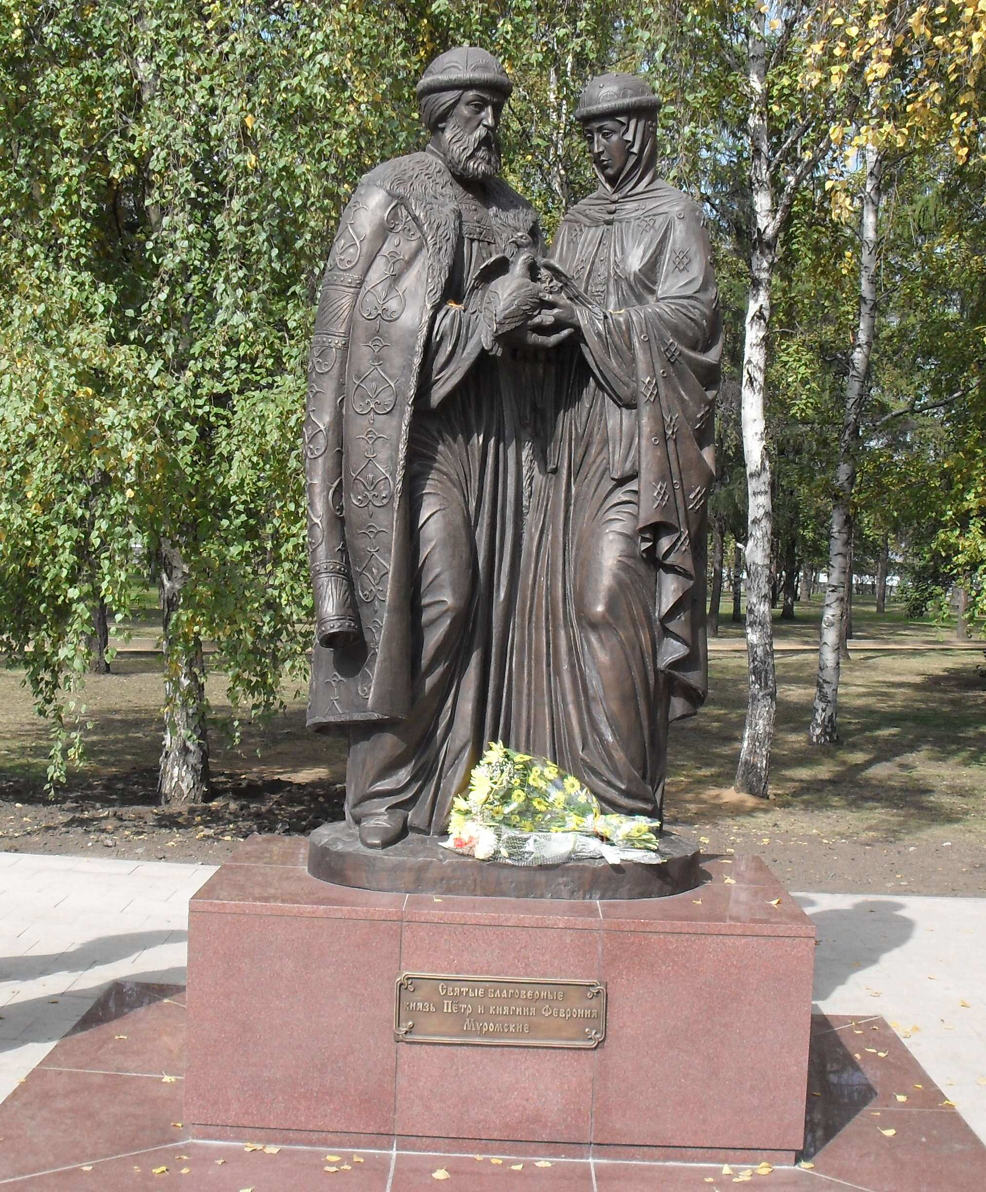 Иркутск. Иркутск. Памятник Святым Петру и Февронье